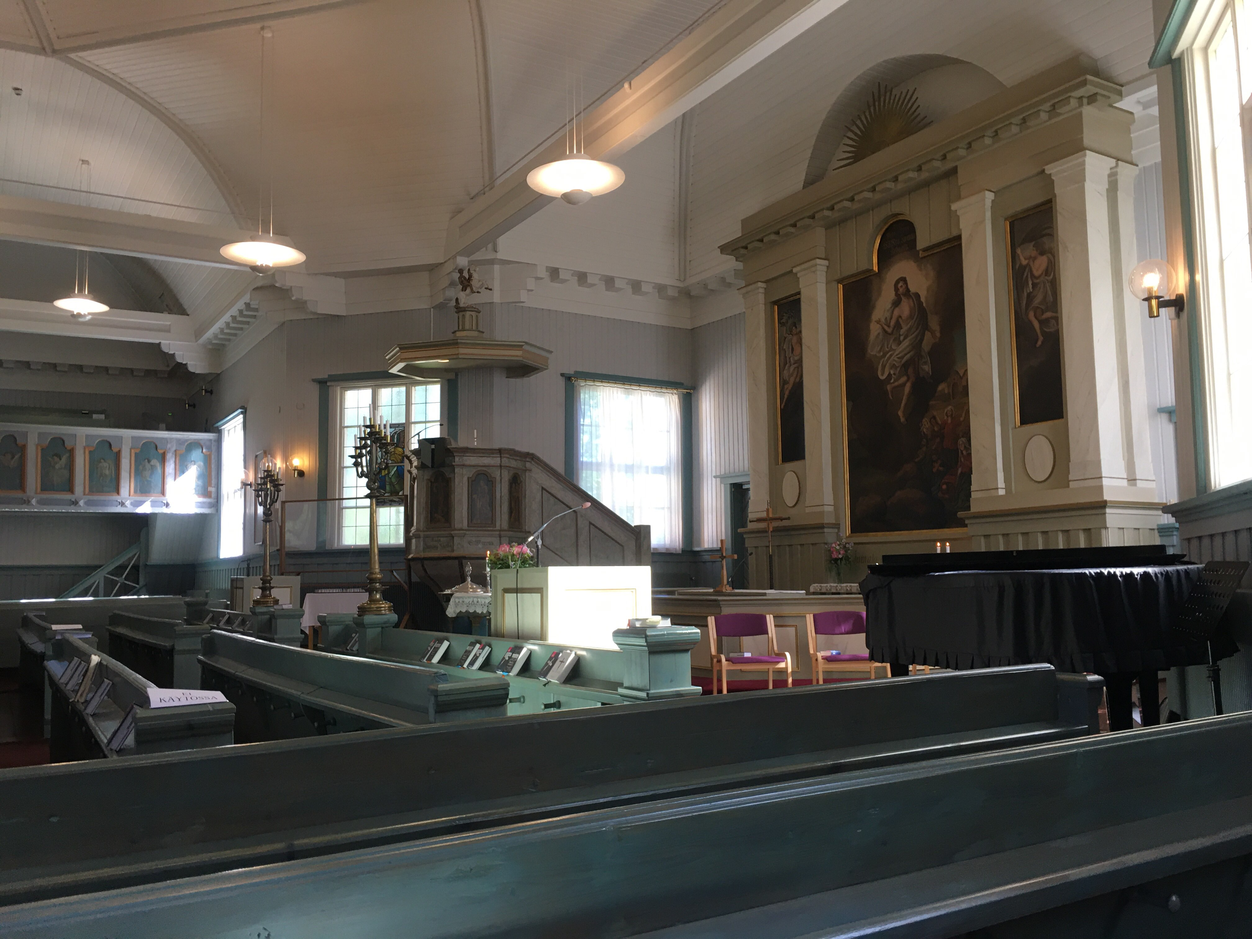 Nurmijärven Kirkko sisältäpäin